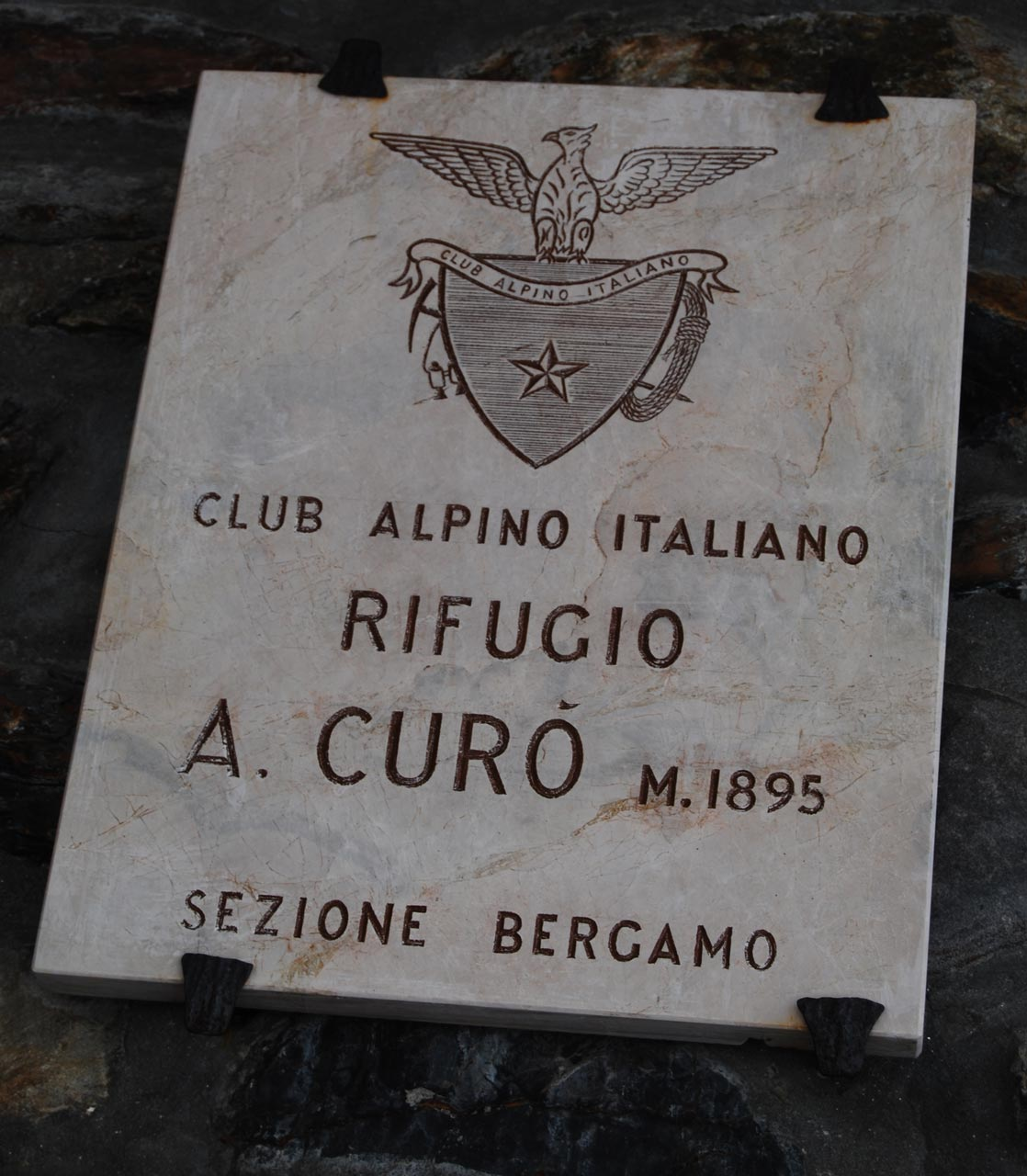 La targa del rifugio Antonio Curò